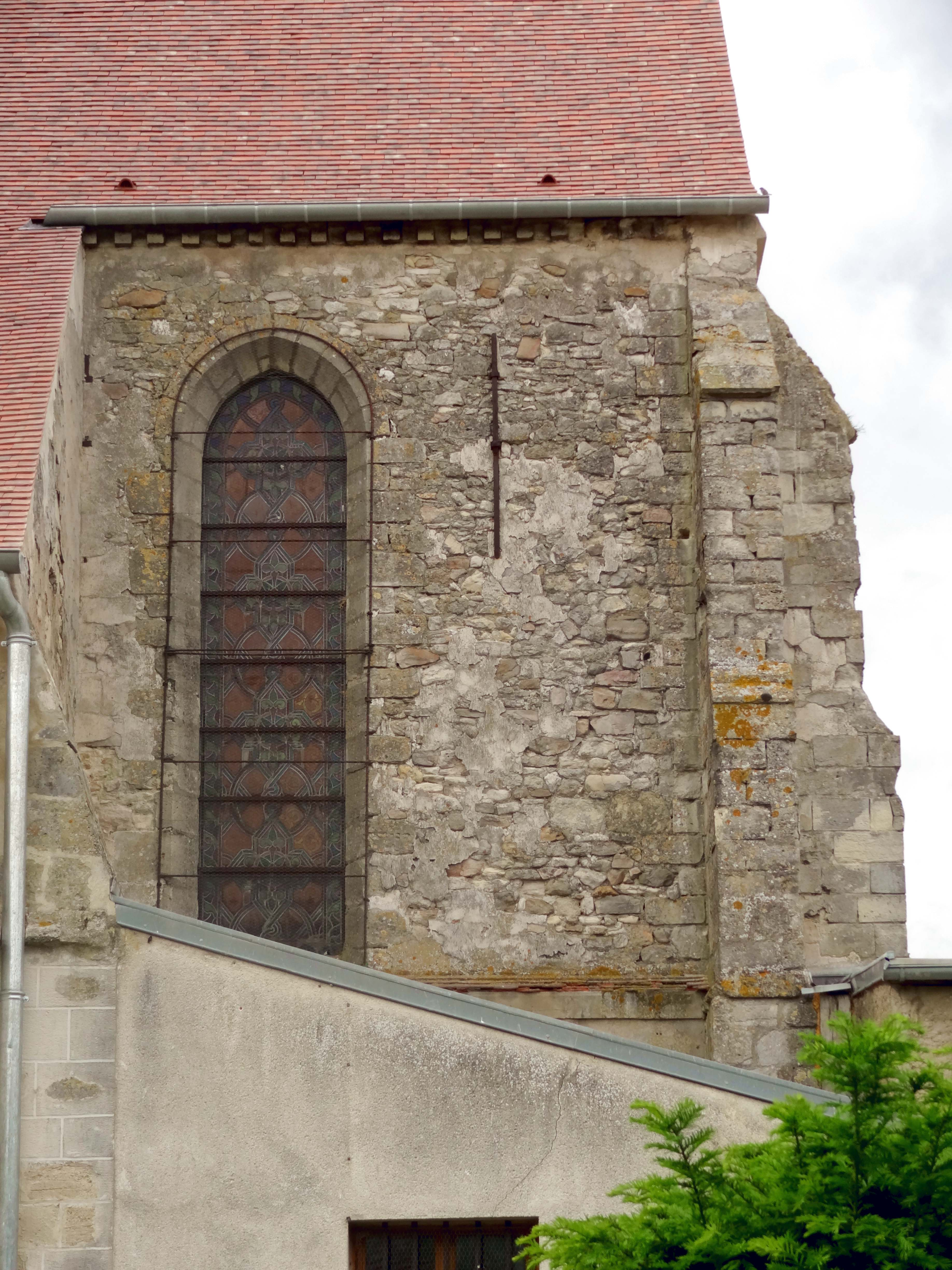 Église Saint-Denis de Ver-sur-Launette - voir titre.